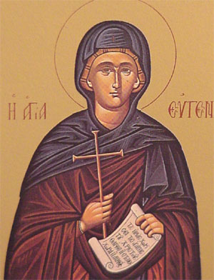 Saint Eugenia